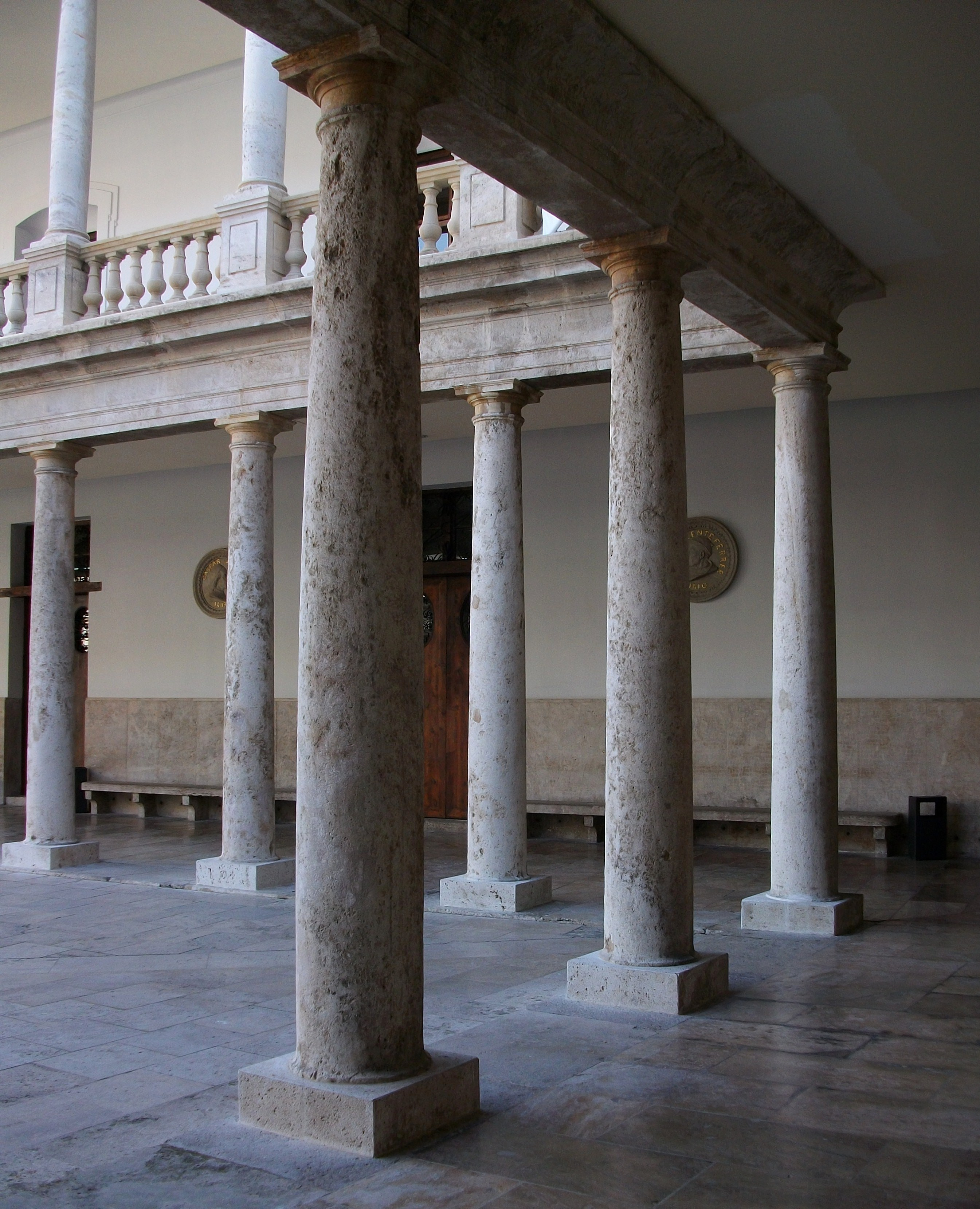 Claustre de la Nau, cantonada.